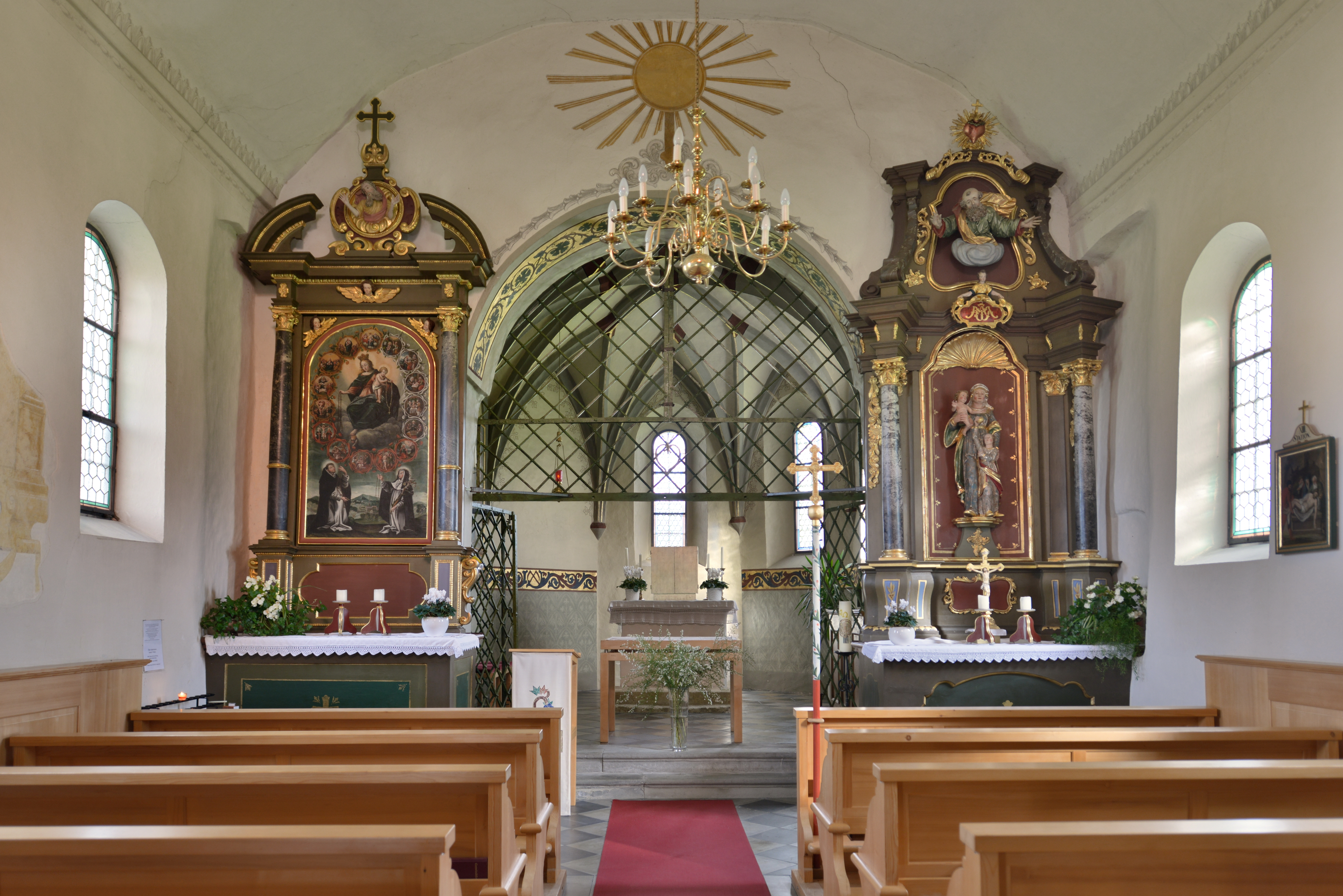 Kapelle (ehemals Filialkirche) "hl. Anna" in Rankweil, (Brederis).